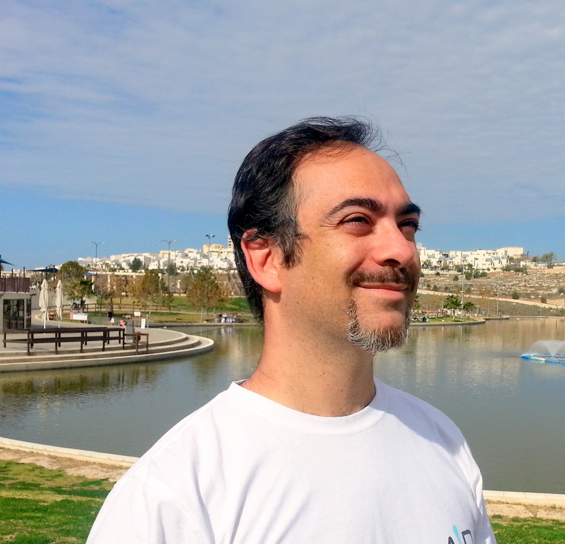 לירון פיין